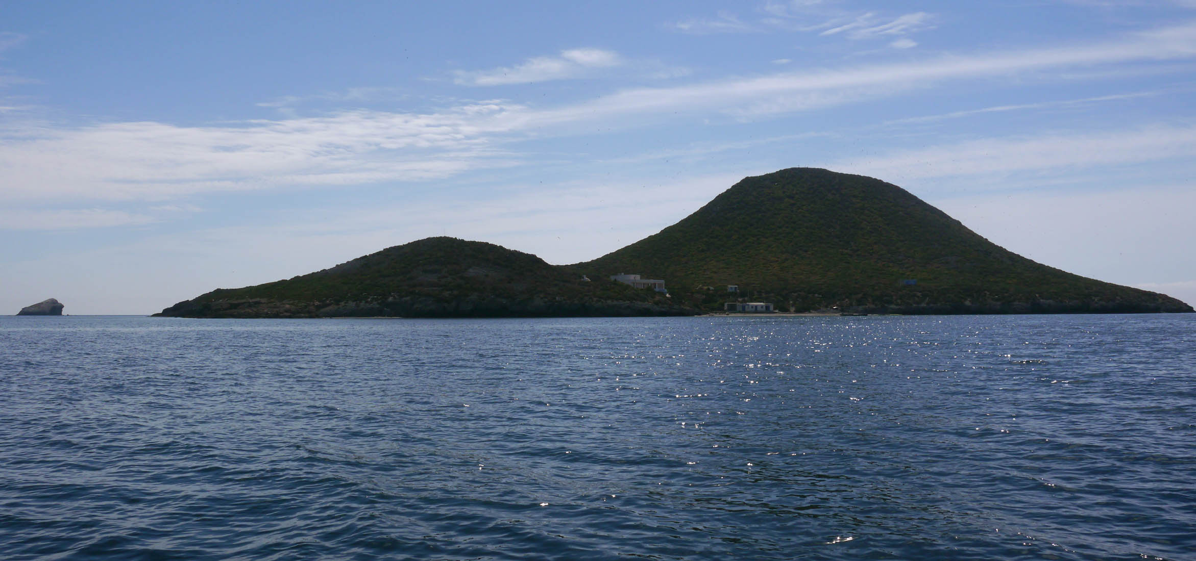 Isla Grosa e islote del Farallón en la Región de Murcia (España).